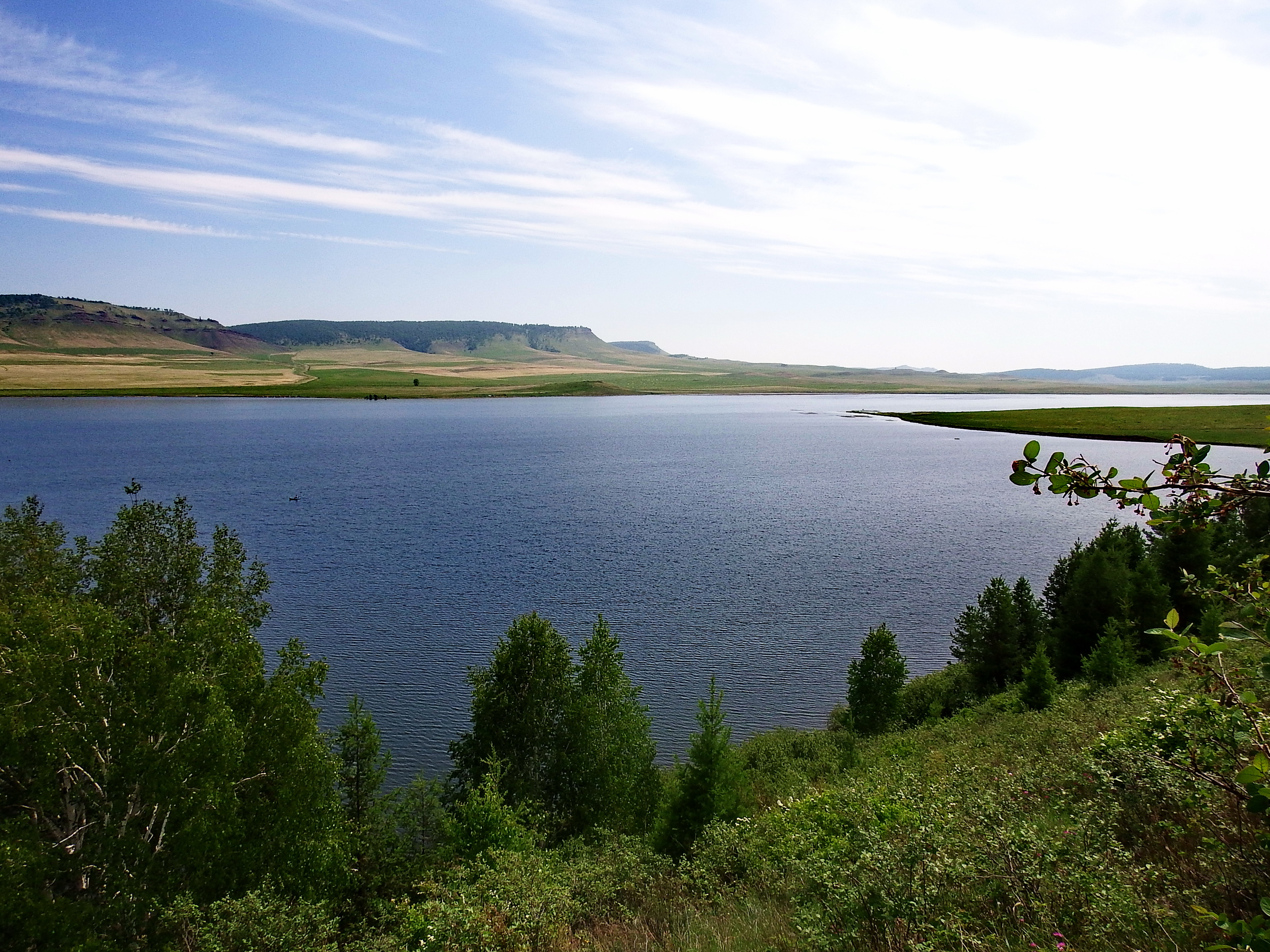 Озеро Малое: Шарыповский район, Красноярский край This image is related to the protected area of Russia number 2410214